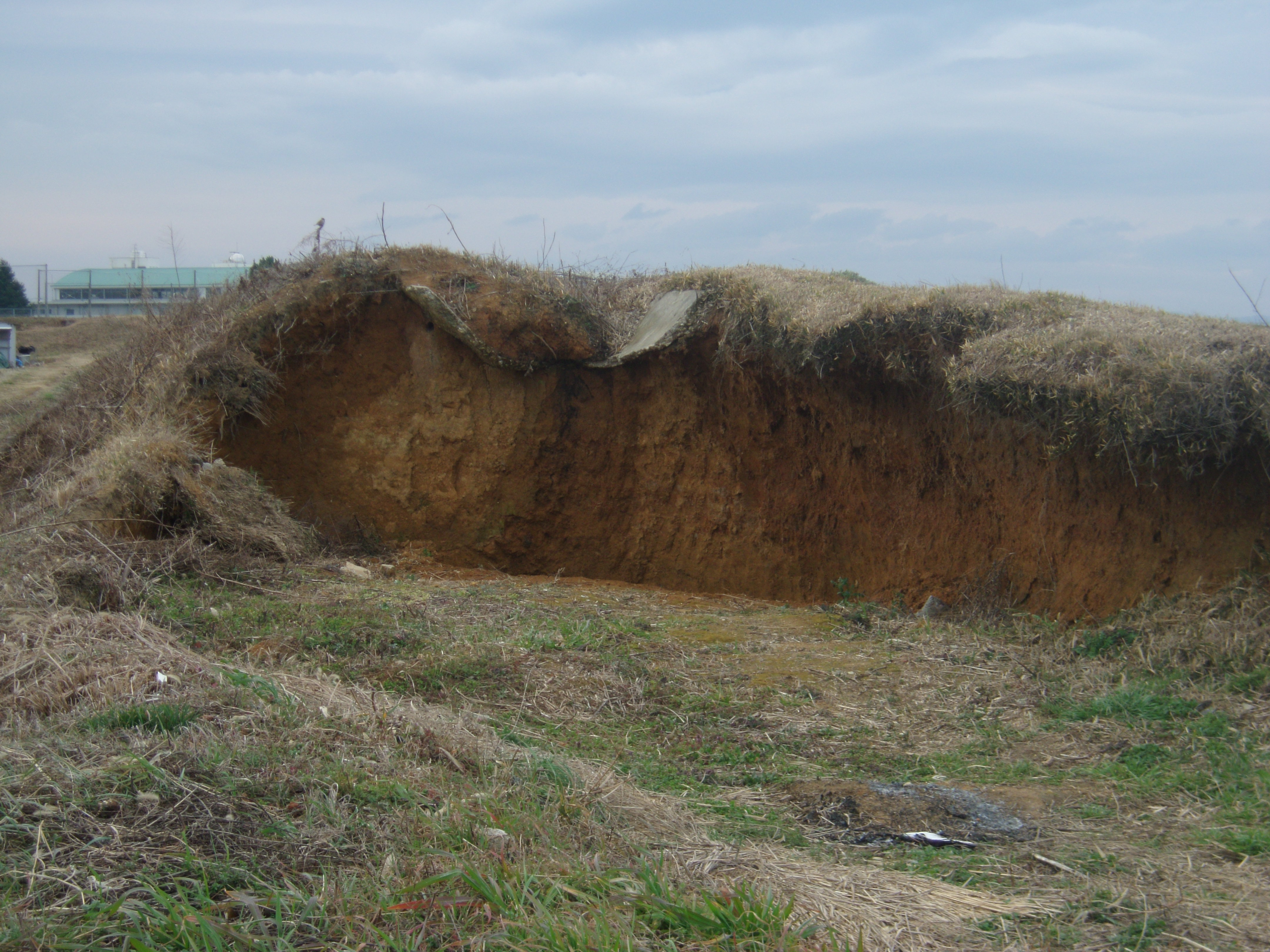 曇川から取水された青之井用水の万才池と凱旋池を結ぶ旧路 土塁が築かれその上を水路が流れていた 現在は使われなくなり土塁が崩れ、水路は埋まっている